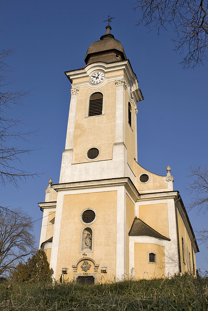 Zsámbék, Keresztelő Szent János főplébániatemplom